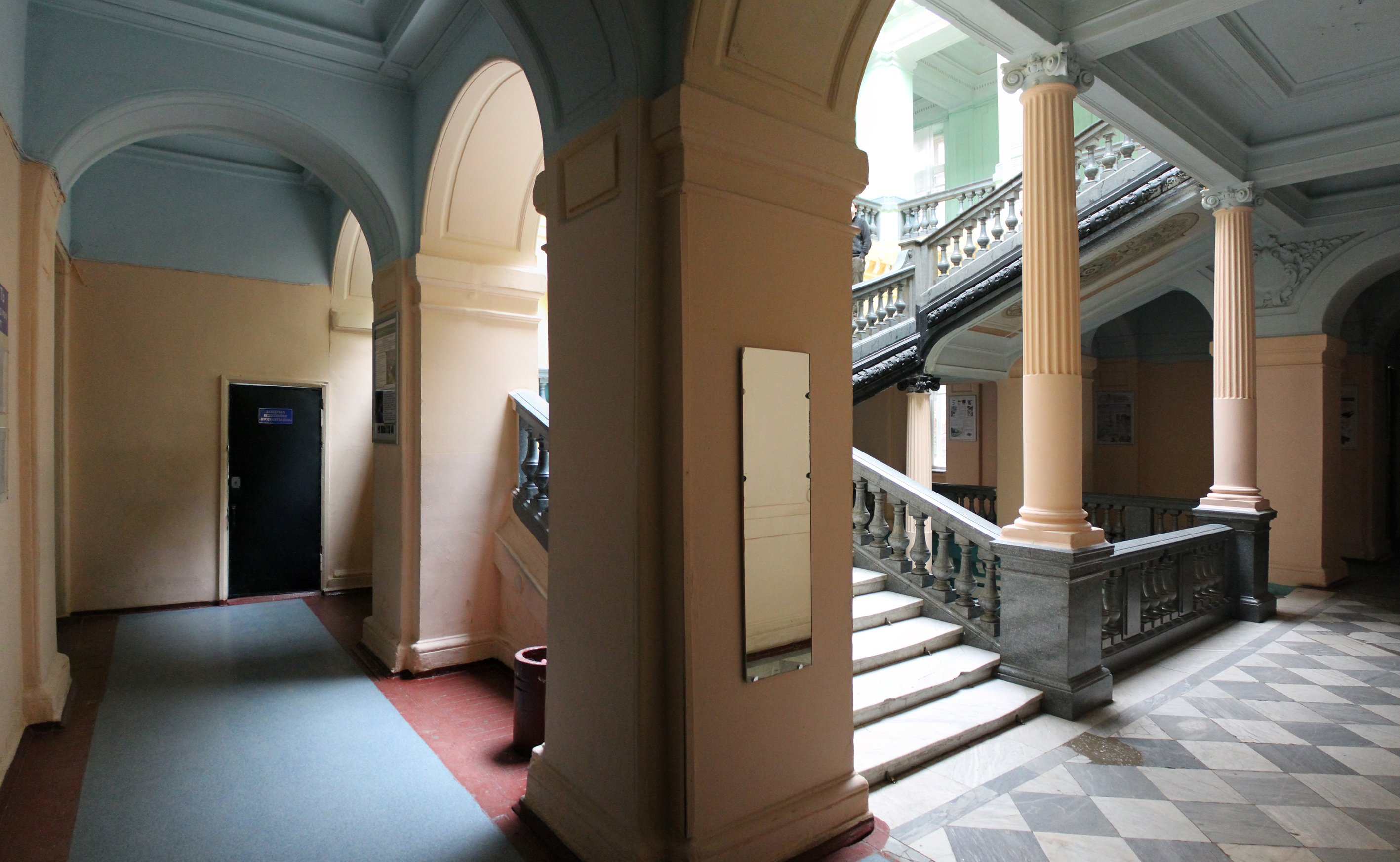 Парадні сходи. Будинок Ради з'їзду гірничопромисловців півдня Росії, вул. Сумська, 18/20, м.Харків